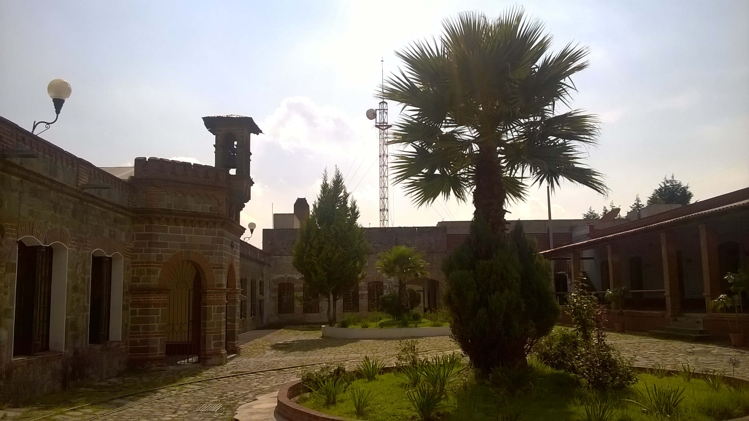 Exfábrica de San Manuel, Santa Cruz Tlaxcala